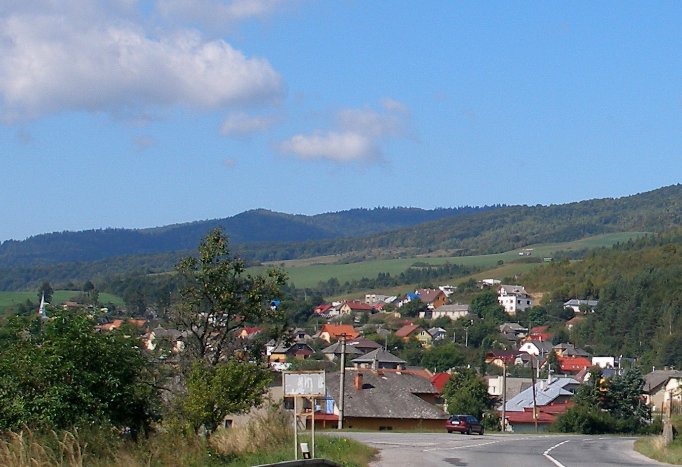 Spišská obec Helcmanovce. Okres Gelnica